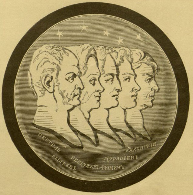 Головачев, П. М. Декабристы : 86 портретов, вид Петровского завода и 2 бытовых рисунка того времени. - М., [1906]